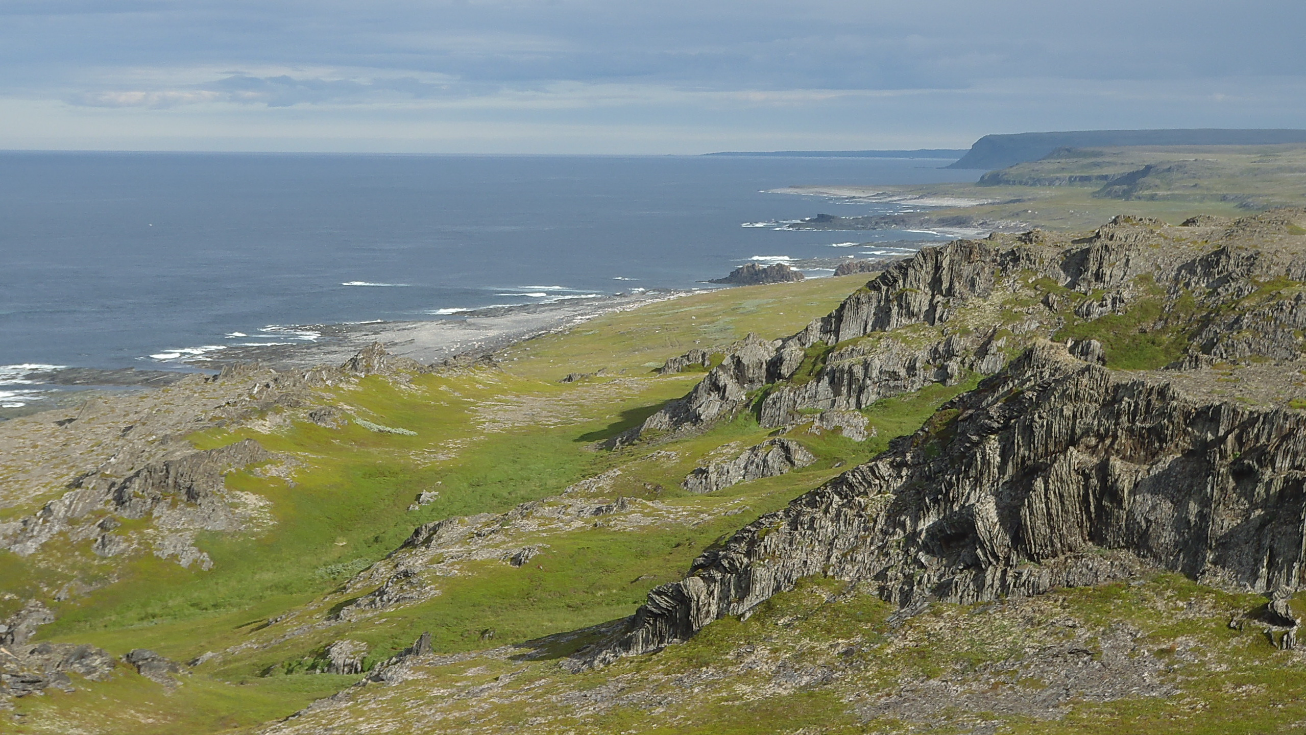 Fantastic landscape